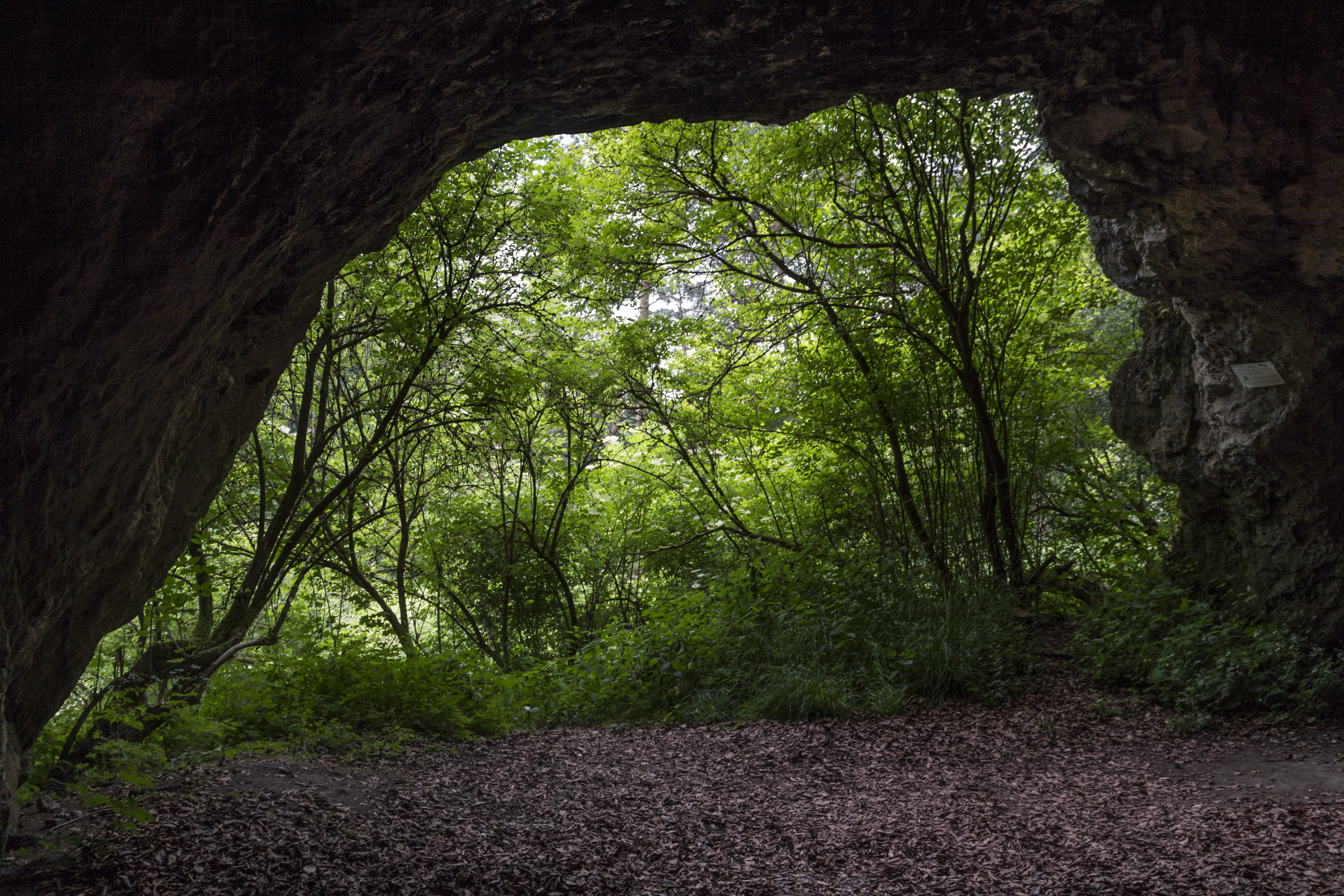 Großes Rohenloch bei Plech